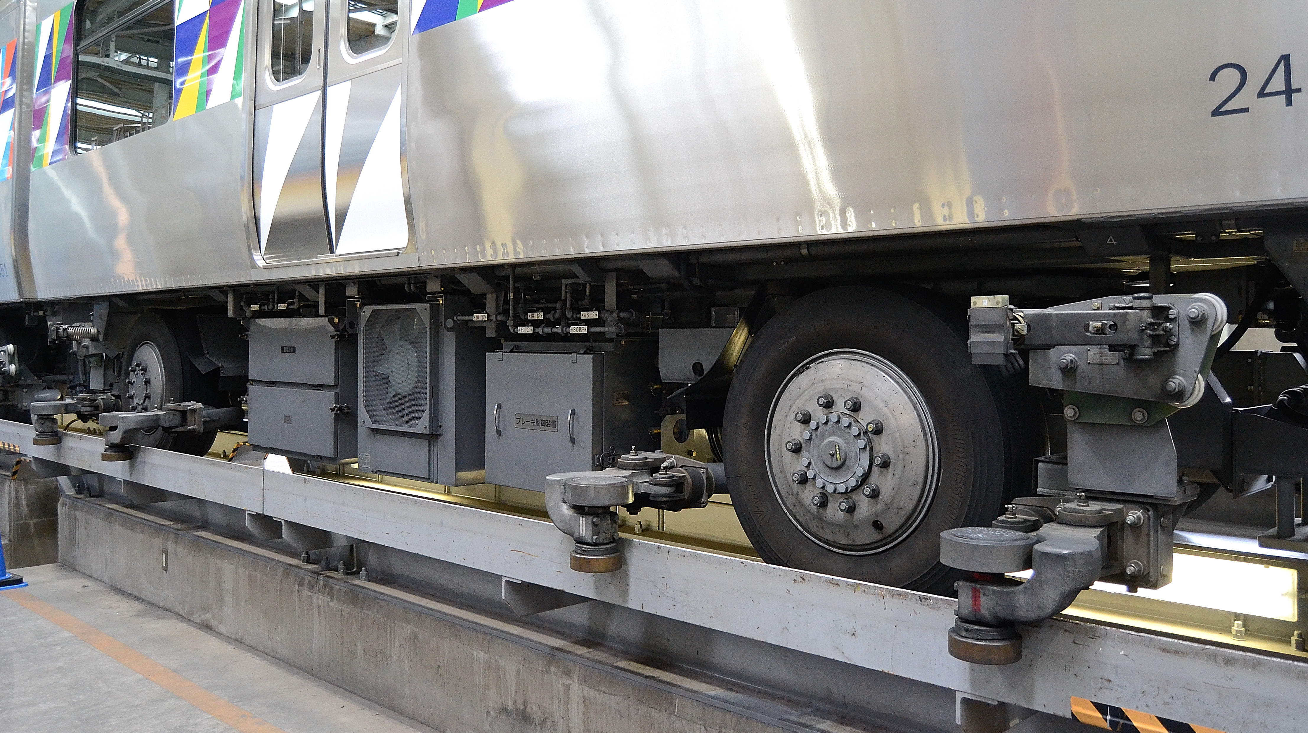 横浜新都市交通2000形の車体下部にある走行装置と案内輪（シーサイドラインフェスタでの車両基地公開時に撮影）。